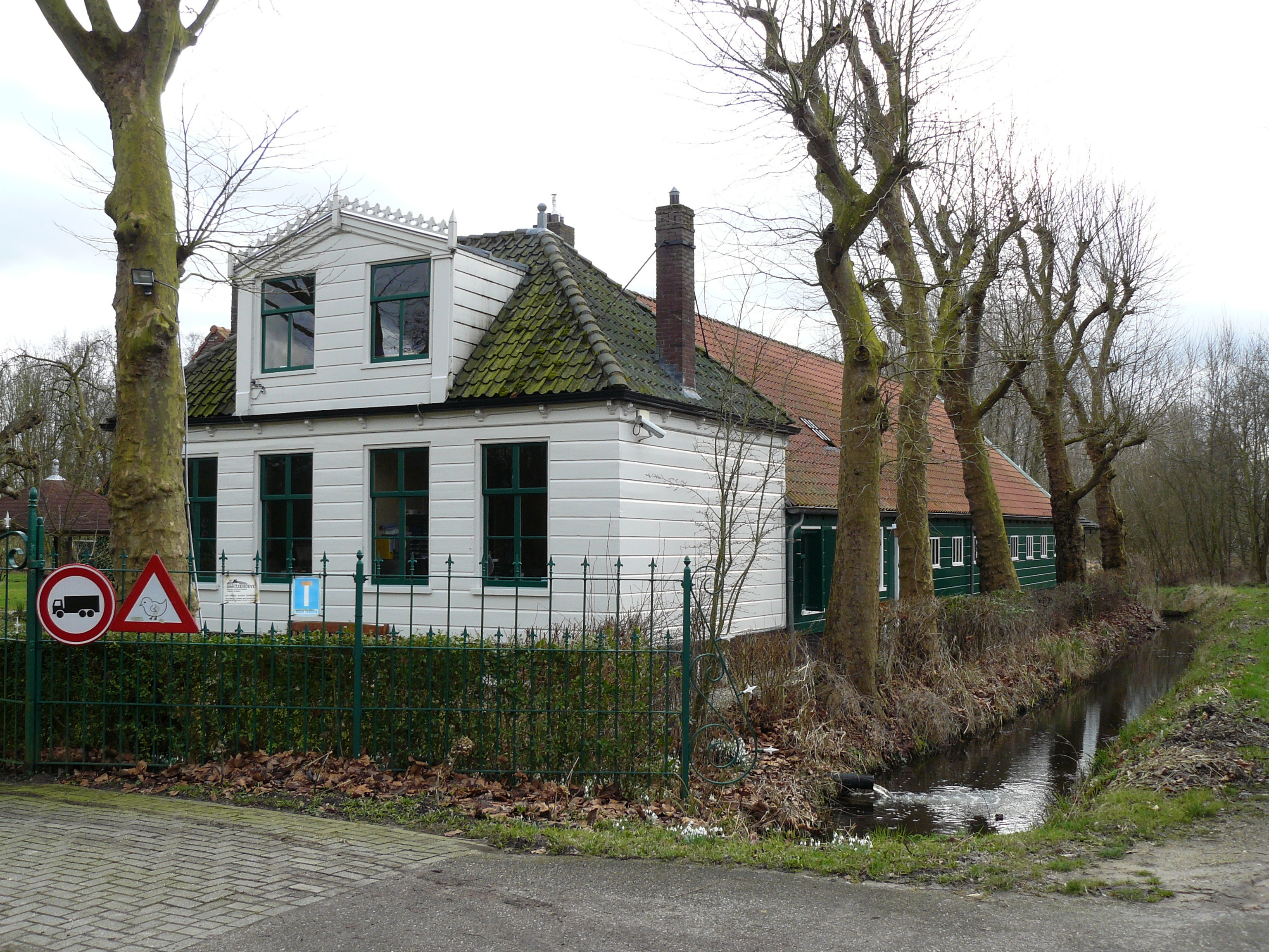 De gerestaureerde kringenwetboerderij De Zeehoeve.